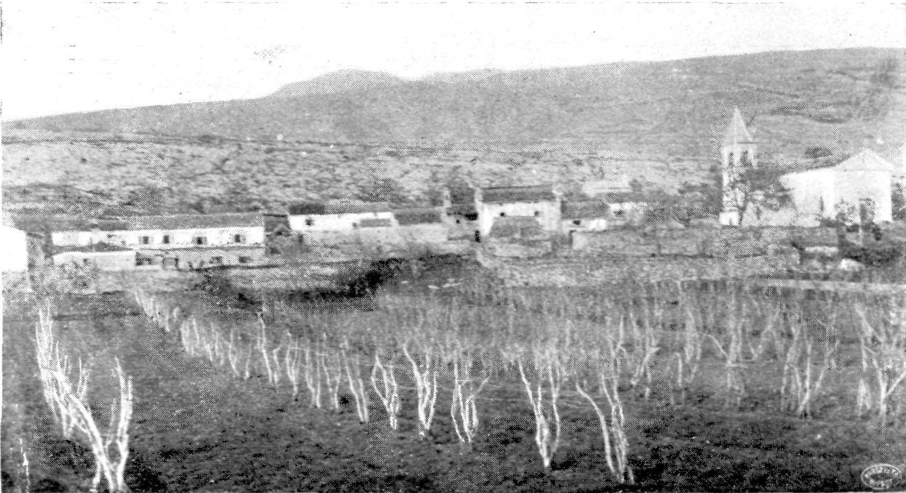 View from Șușnievița